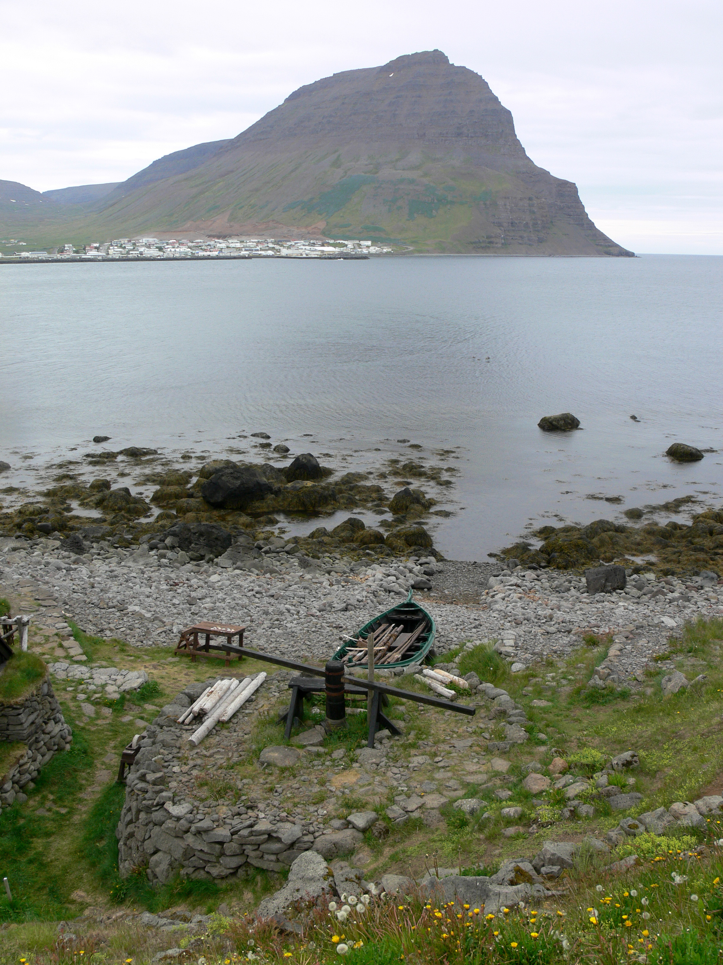 Freilichtmuseum Ósvör in der Nähe von Bolungarvík. Im Hintergrund Bólungarvík und der Berg Traðarhorn